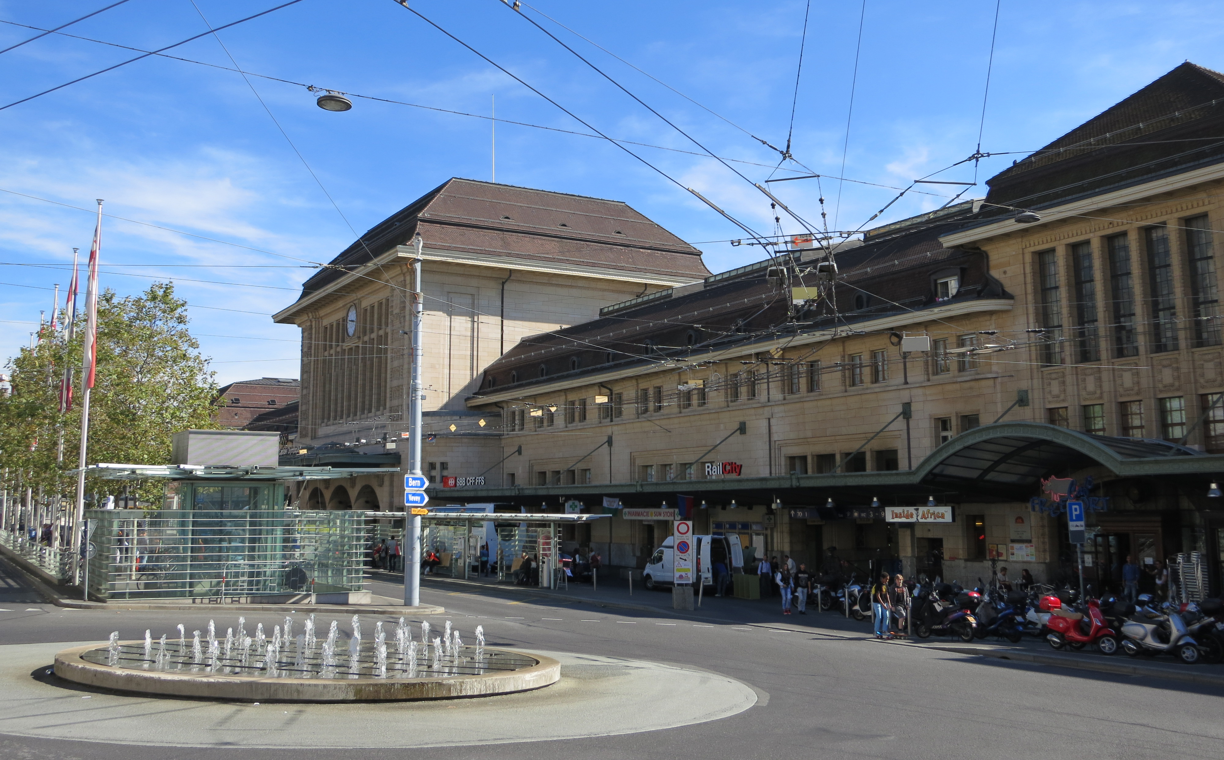 Bahnhof Lausanne